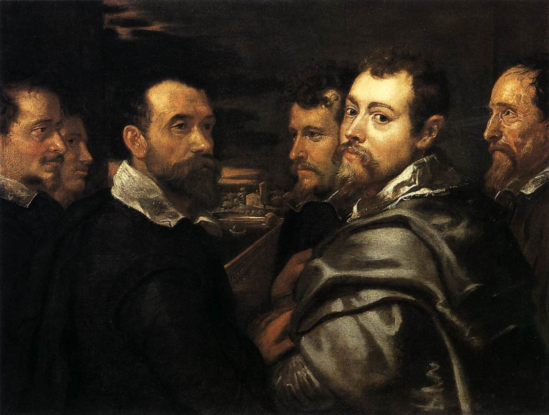 Peter Paul Rubens, Selbstporträt in einem Kreis gelehrter Freunde in Mantua. Neben ihm sein Bruder Philipp, hinter ihm (rechter Bildrand) Justus Lipsius; ihm gegenüber vielleicht Galileo Galilei (Wallraf-Richartz-Museum), oder William Richardot (Edward H. Wouk Frans Floris (1519/20–70): Imagining a Northern Renaissance 2018, p. 532)